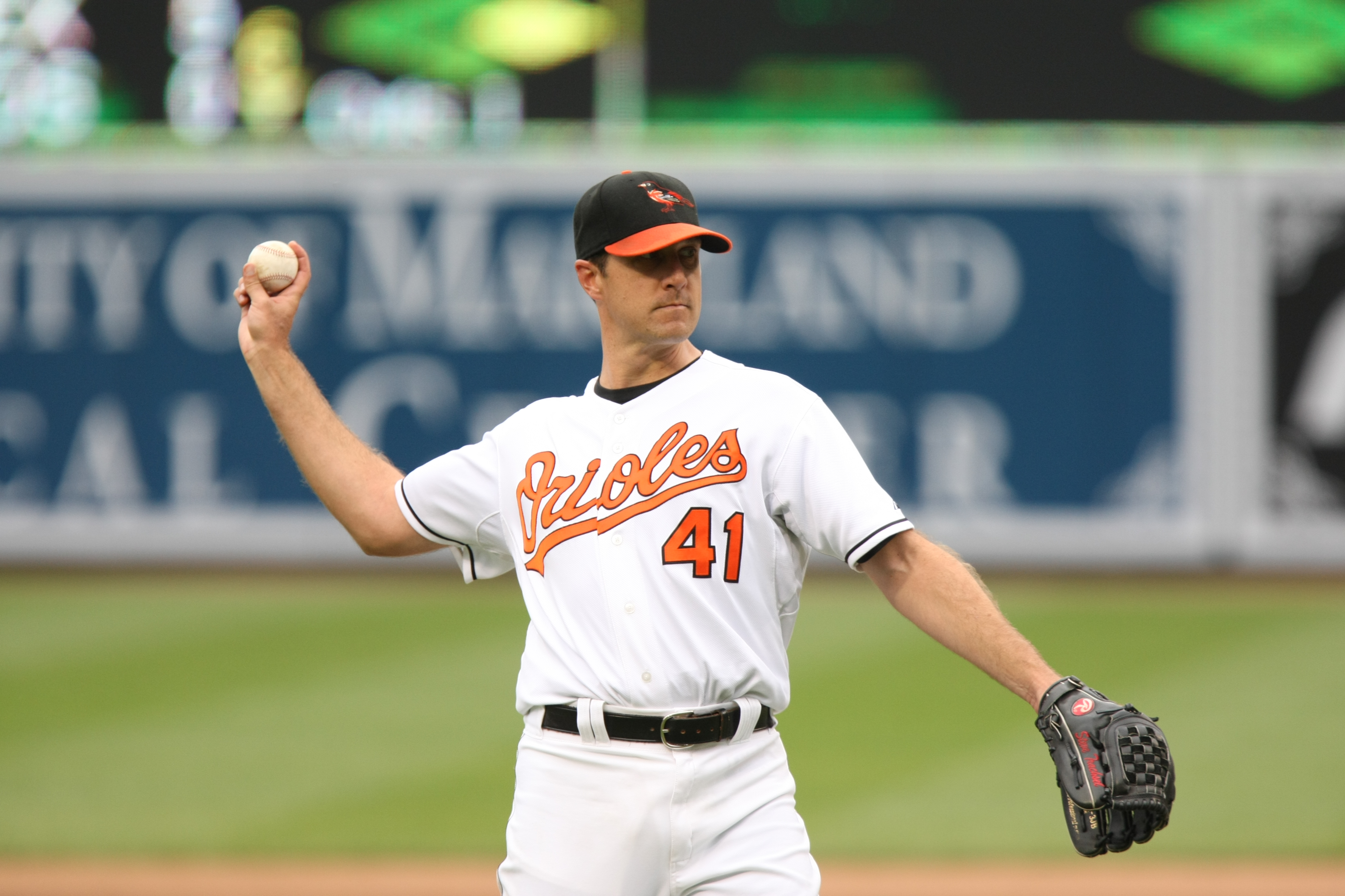 Steve Trachsel